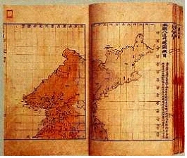 본조팔도주현총목도